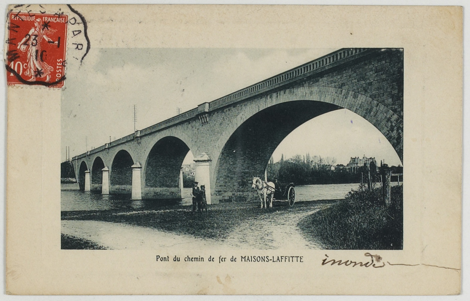 Pont ferroviaire à cinq arches en pierre construit en 1895 et franchissant le grand bras de la Seine entre Sartrouville et Maisons-Laffitte